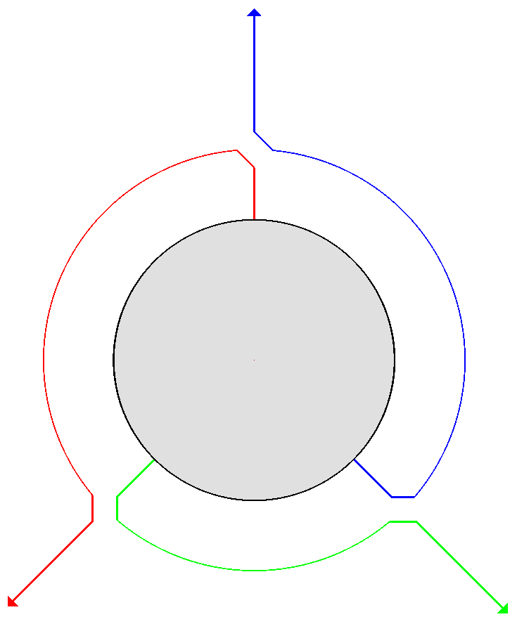 Baumknoten bei Wirbeltraversierung (einmal besucht)